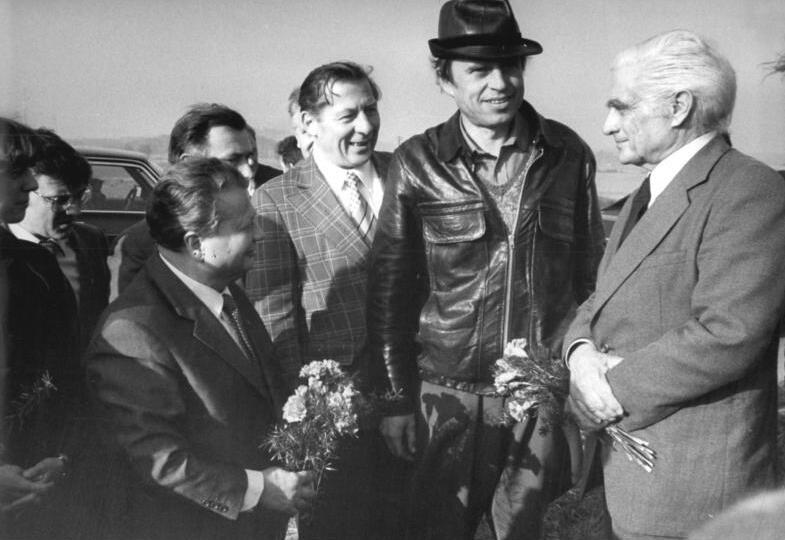 LPG Woldegk, Besuch einer portugiesischen Delegation ADN-ZB Bartocha BL-22.10.82- Bez. Neubrandenburg: Cunhal-Besuch- Der Generalsekretär der Portugiesischen Kommunistischen Partei, Alvaro Cunhal (r.), wurde herzlich auf dem Zuckerrübenkomplex der LPG Pflanzenproduktion Woldegk begrüßt. Der LPG-Vorsitzende Joachim Henke (2.v.r.) erläuterte ihm und Hermann Aken (3.v.l.), Mitglied des Politbüros und Sekretär des ZK der SED, die Arbeitsaufgaben dieses Komplexes.